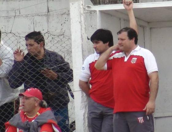 Hello